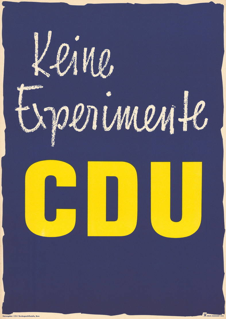 Keine Experimente CDUPlakatart:Textplakat AllgemeinAuftraggeber:CDU-Bundesgeschäftsstelle BonnDrucker_Druckart_Druckort:Rheindorff, KölnObjekt-Signatur:10-001: 605Bestand:Plakate zu Bundestagswahlen (10-001)GliederungBestand10-18:Plakate zu Bundestagswahlen (10-001) » Die 3. Bundestagswahl am 15. September 1957 » CDU » Textplakate allgemeinLizenz:KAS/ACDP 10-001: 605 CC-BY-SA 3.0 DE